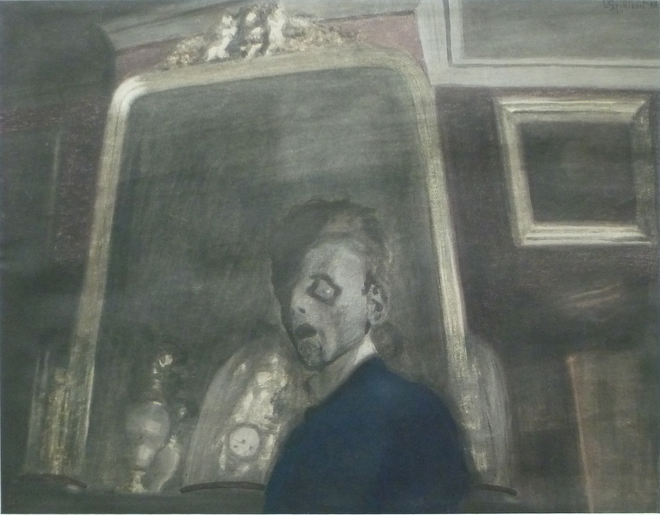 "Zelfportret voor de spiegel" (1908); gewassen Oost-Indische inkt, gouache, aquarel en pastel door de Belgische kunstenaar Léon Spilliaert; 48 x 63 cm; Mu.ZEE, Oostende